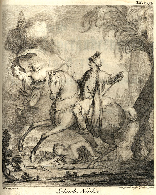 Nadir Shah (Nadir Qoli Beg, Tahmasp-Qoli Kha)